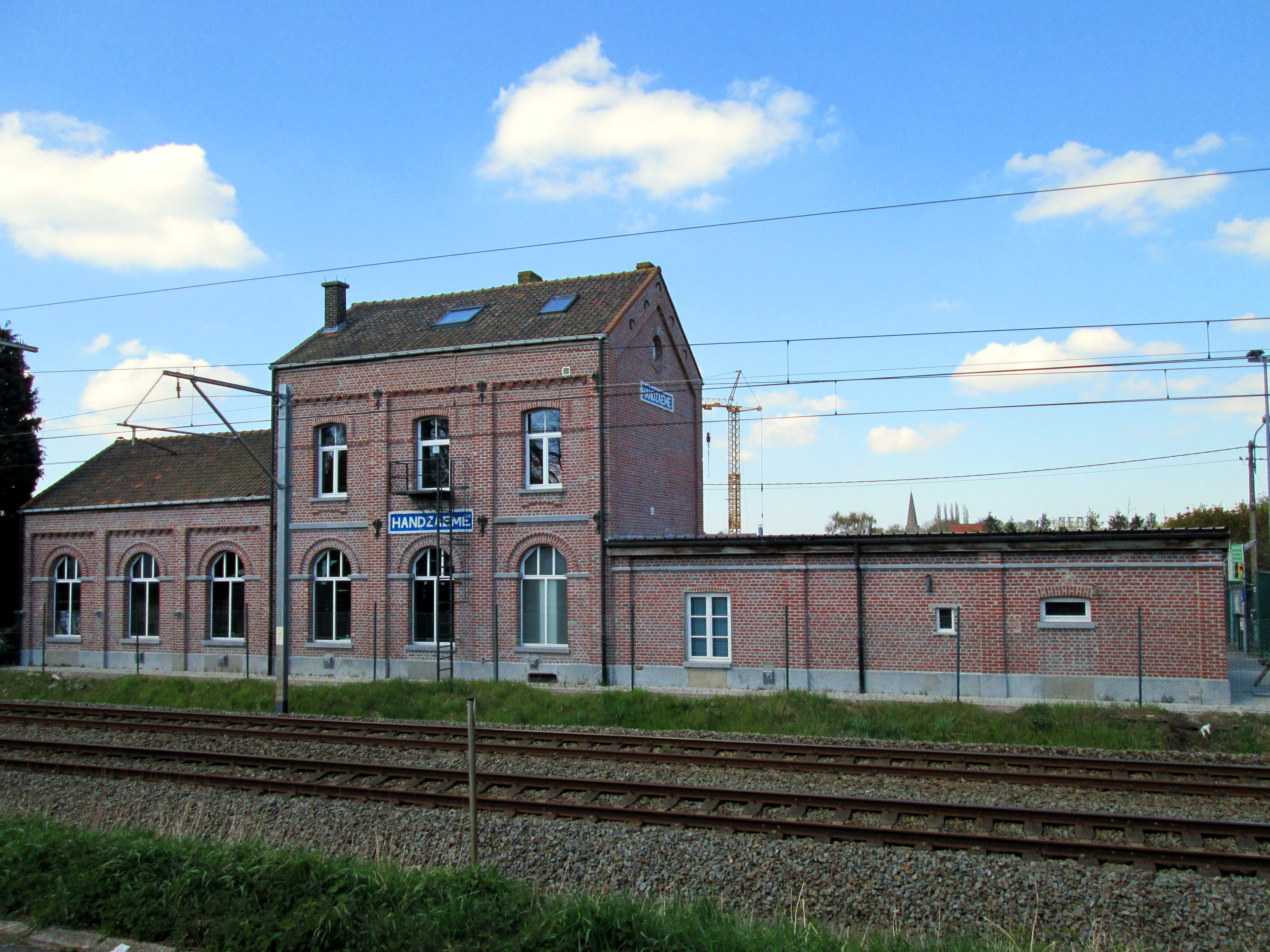 Het gerenoveerde stationsgebouw (na renovatie 2012).